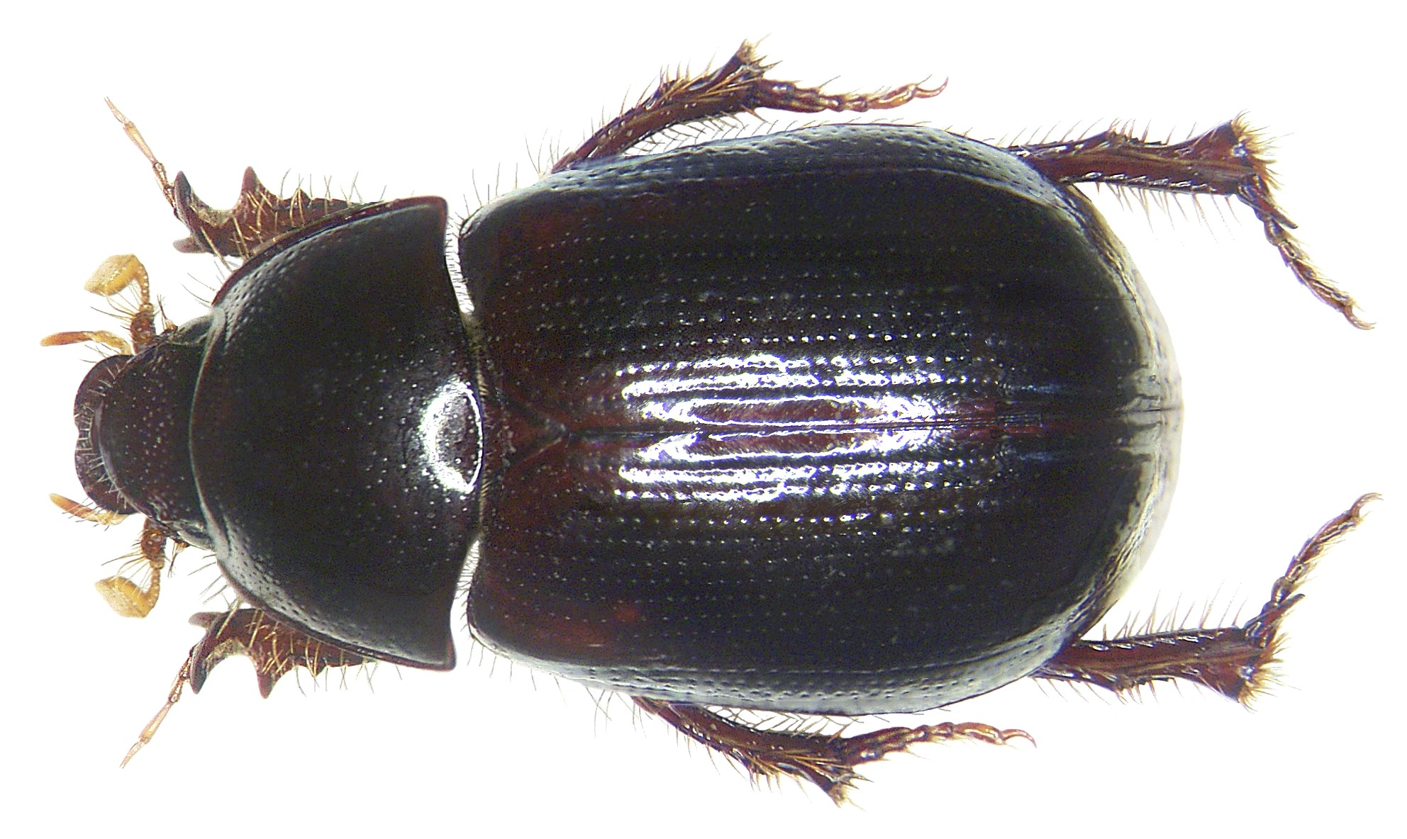 Familie: Scarabaeidae Grösse: 7-8 mm Verbreitung: Afrika, Mittelmeergebiet, Kaukasus, Iran, Indien Fundort: Tunesien, Hammamet leg. U.Schmidt, 1993 Foto: U.Schmidt, 2007